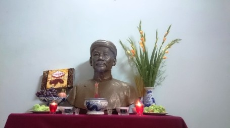 Tượng thờ cúng Lê Đại Cang (hay còn gọi là Lê Đại Cương) tại quê hương ông làng Luật Chánh, xã Phước Hiêp, huyện Tuy Phước (Bình Định)